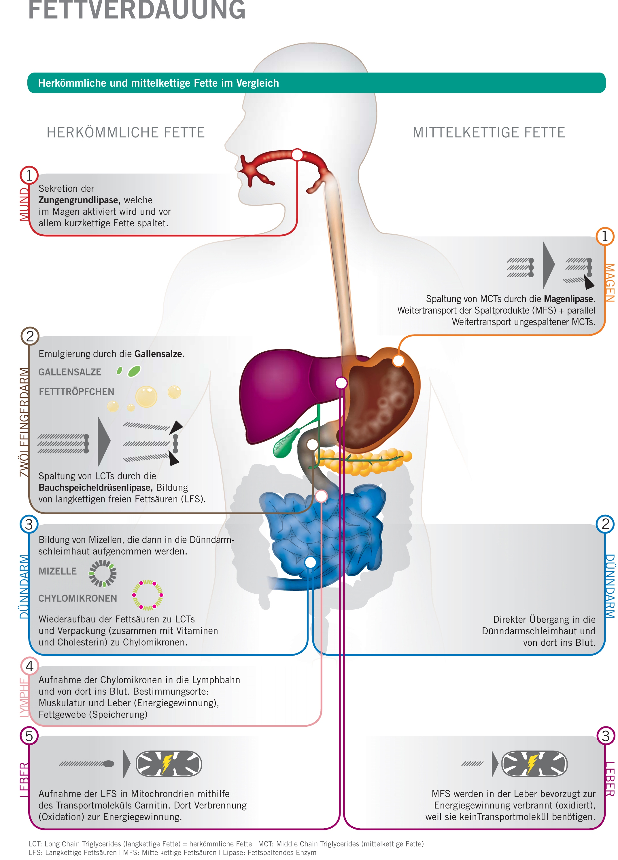 Schematische Abbildung Fettverdauung herkömmliche und mittelkettige Fette